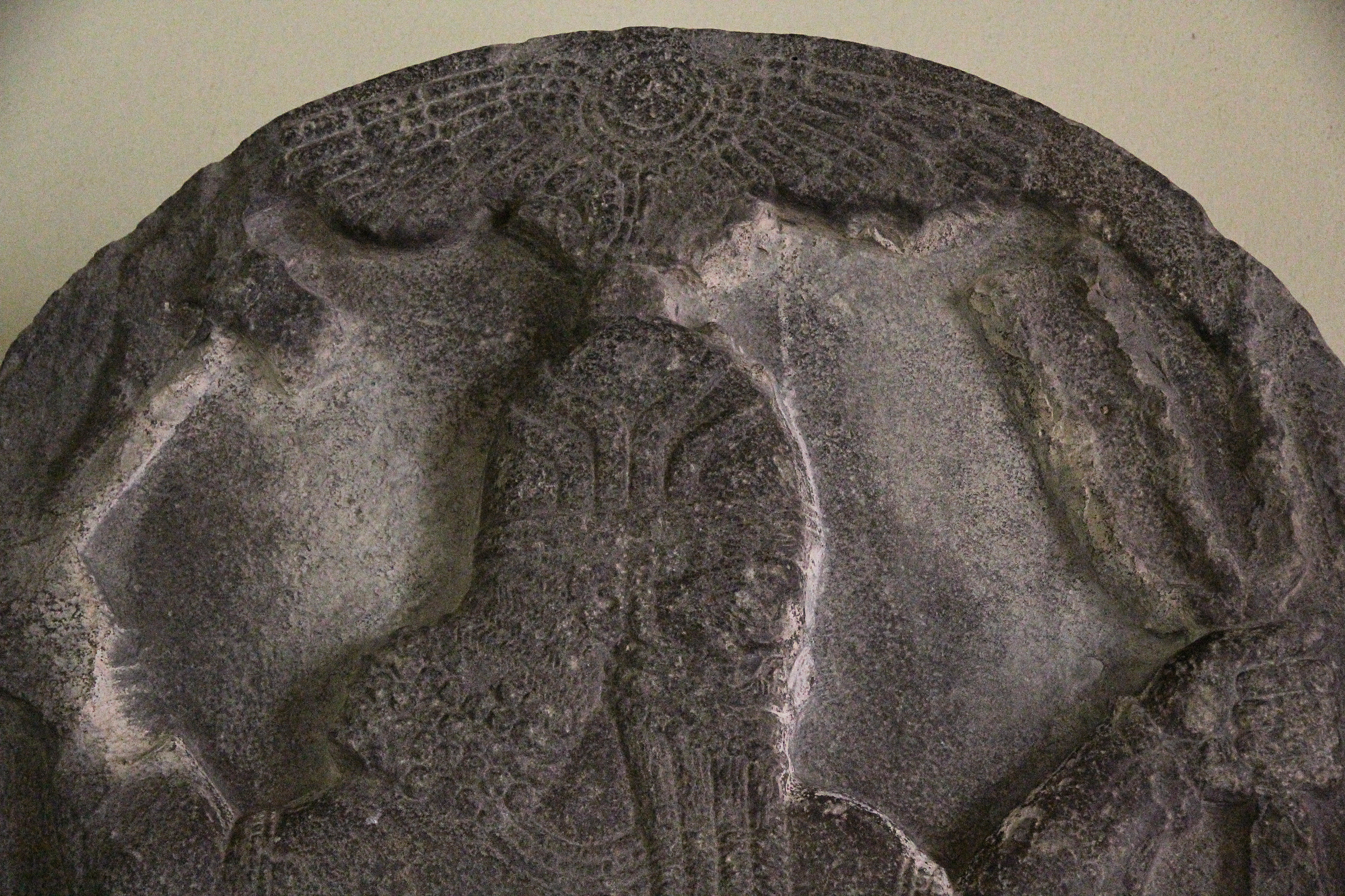 Archäologisches Museum Niğde, Türkei, Stele von Niğde, Ausschnitt. Die Stele zeigt den Wettergott, sie wurde von Muwaharanis errichtet und seinem Vater Warpalawas gewidmet.